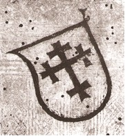 Ecusson de l'Hôpital de Strasbourg au XIVe